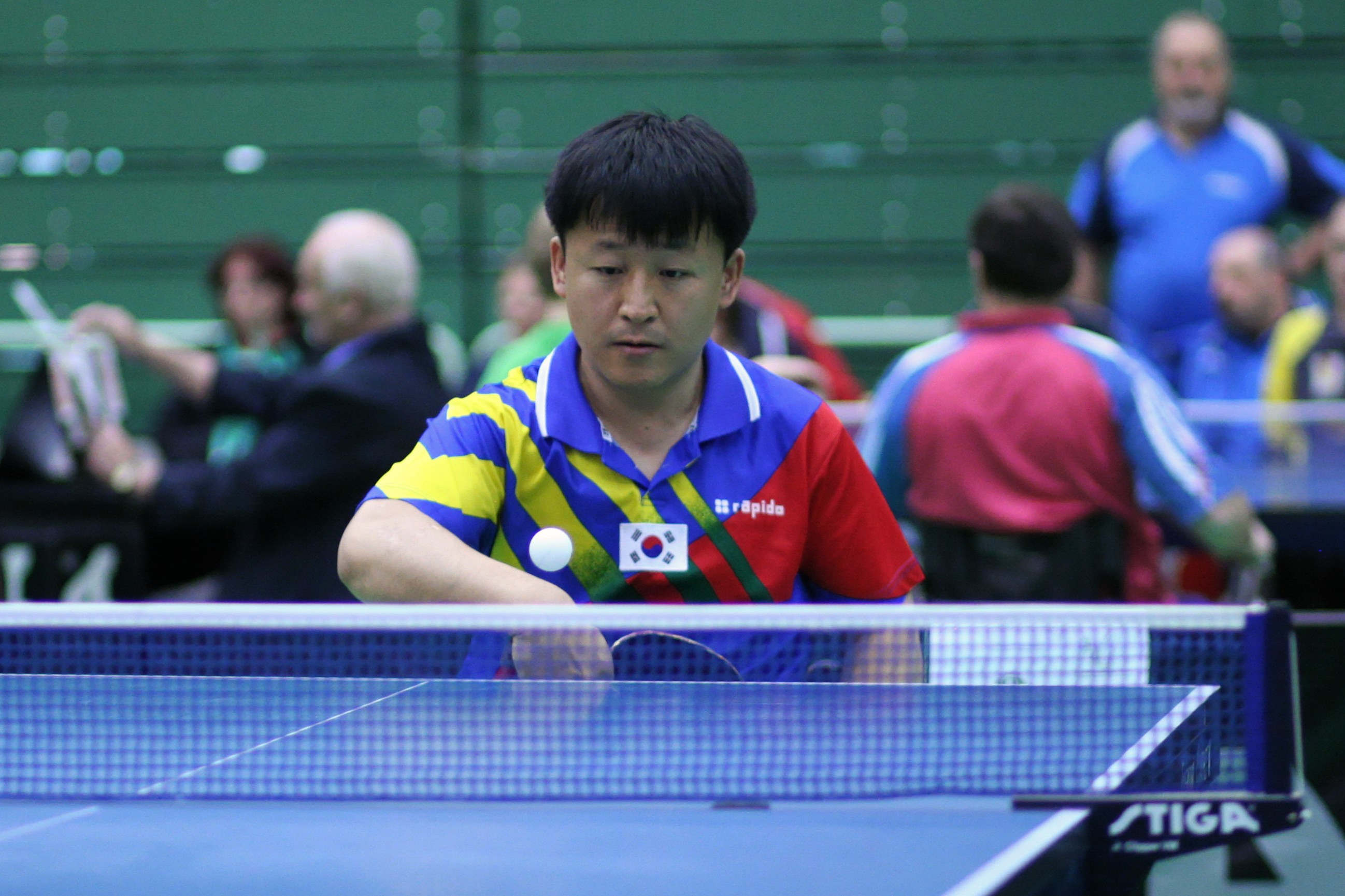 Byoung Young Kim (KOR)